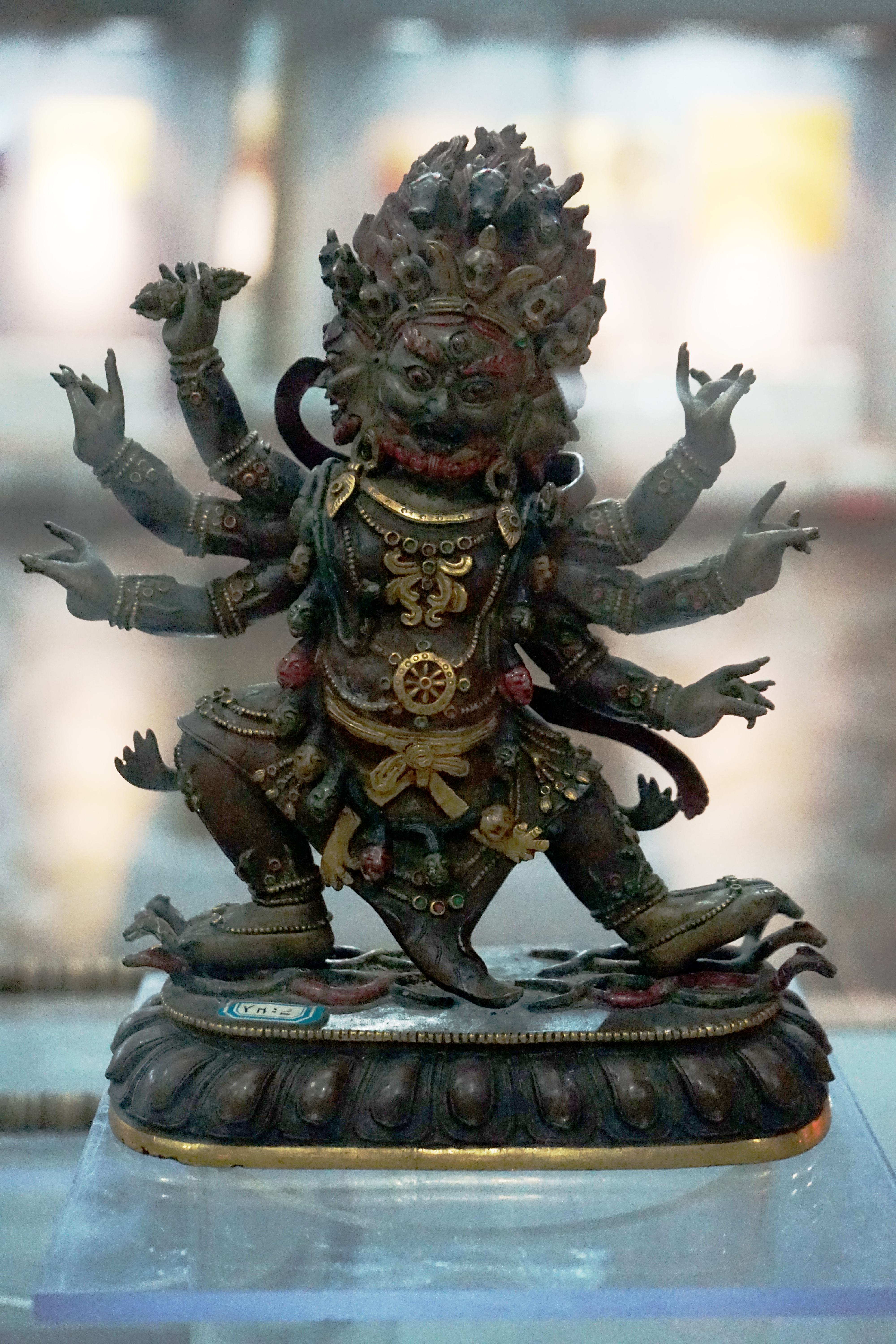 中文（中国大陆）: 多手大德金刚罗汉。清代。腰新乡后新村征集